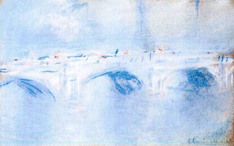 'Waterloo Bridge, London' van Claude Monet (1901). Foto AP - Politie R'dam